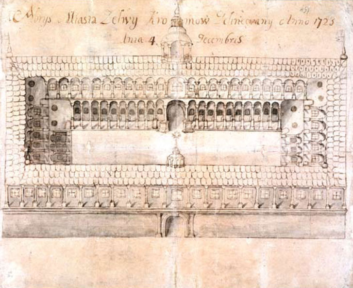 Беларуская (тарашкевіца): Зэльва (Zelva), пляц Рынак (plac Rynak). Крамы)